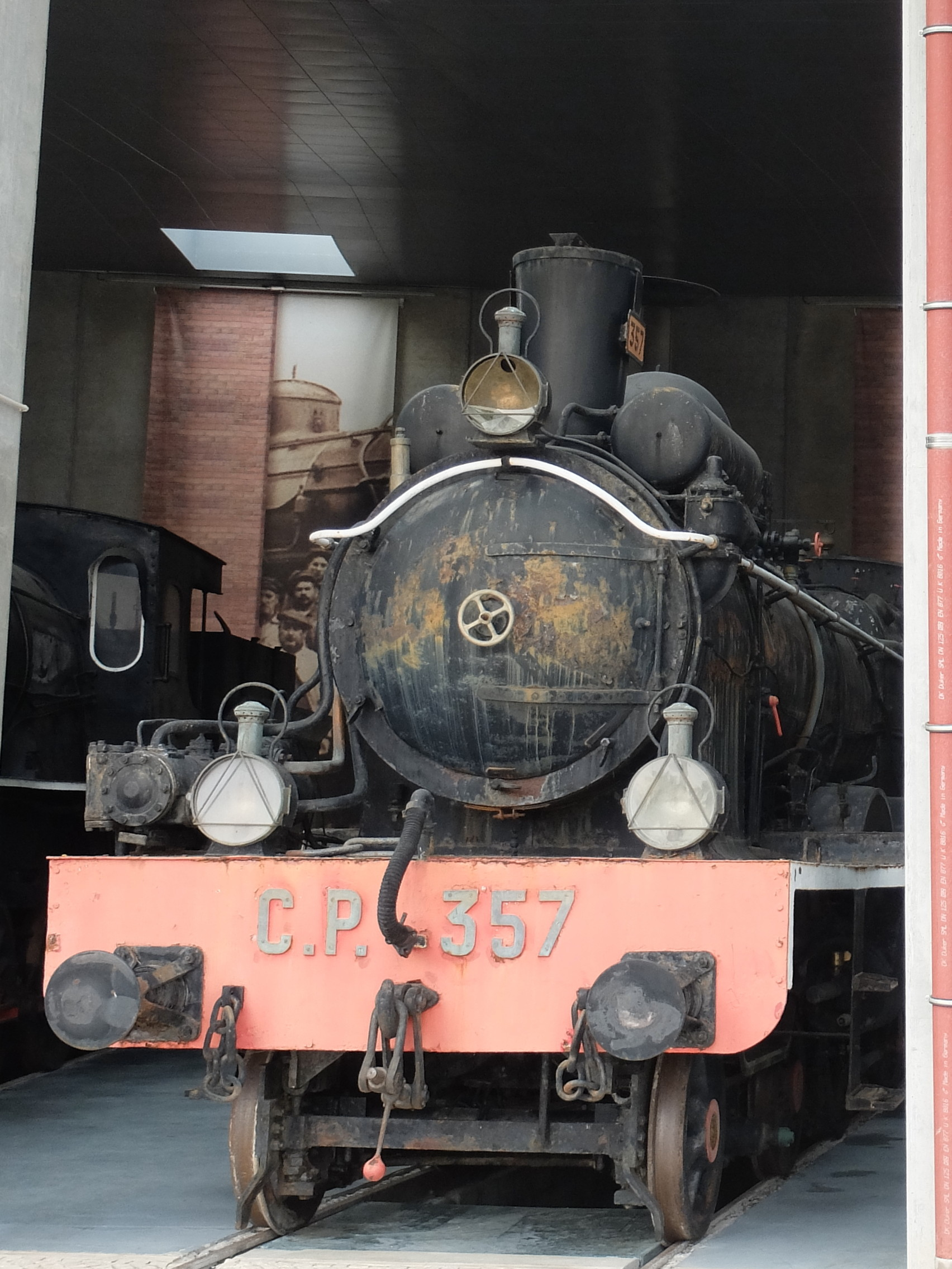 CP 357 im Museu Nacional Ferroviário